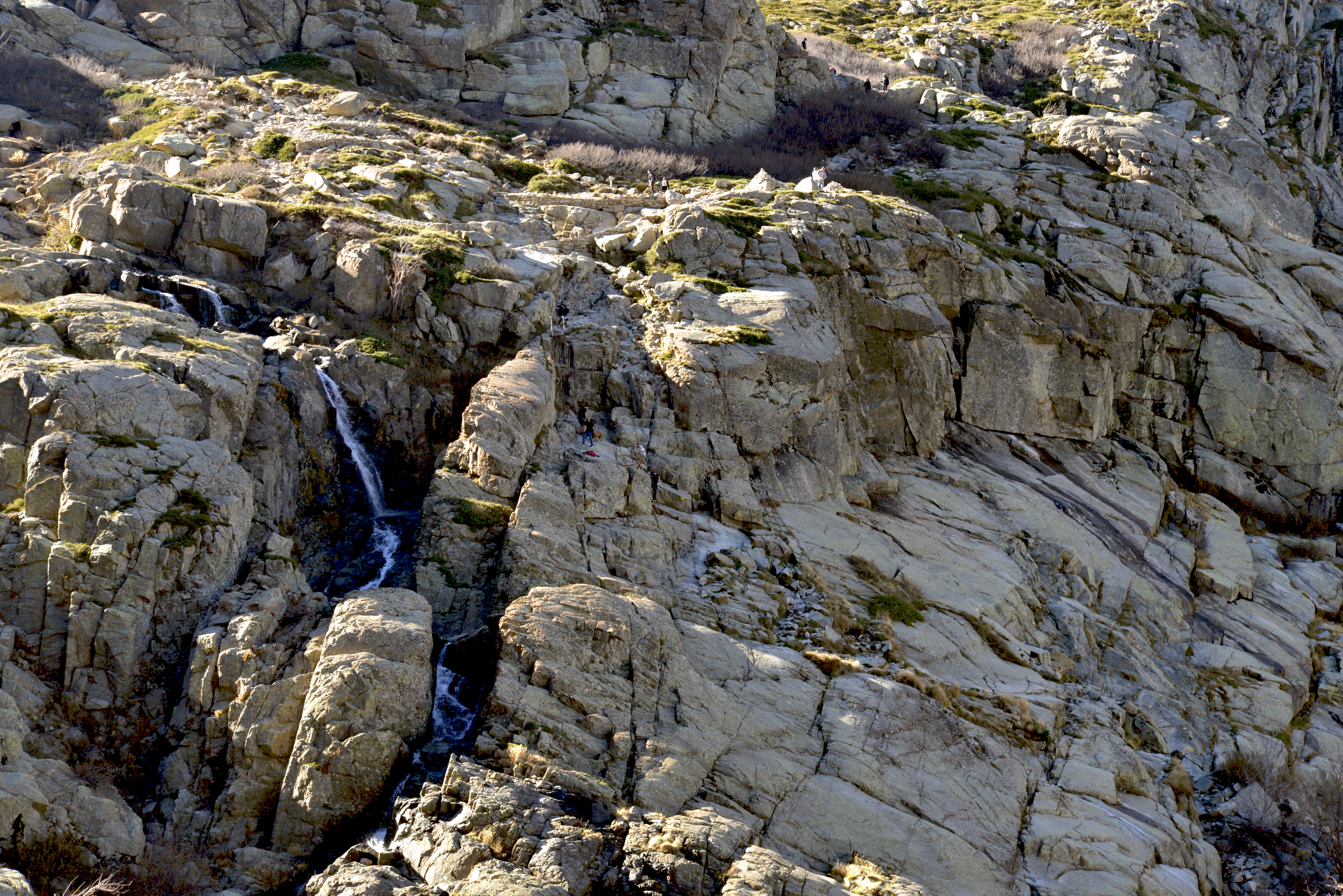 Corte, Centre Corse - Les échelles sur le sentier du lac de Melu. À gauche la rivière Restonica naissante à la sortie du lac.